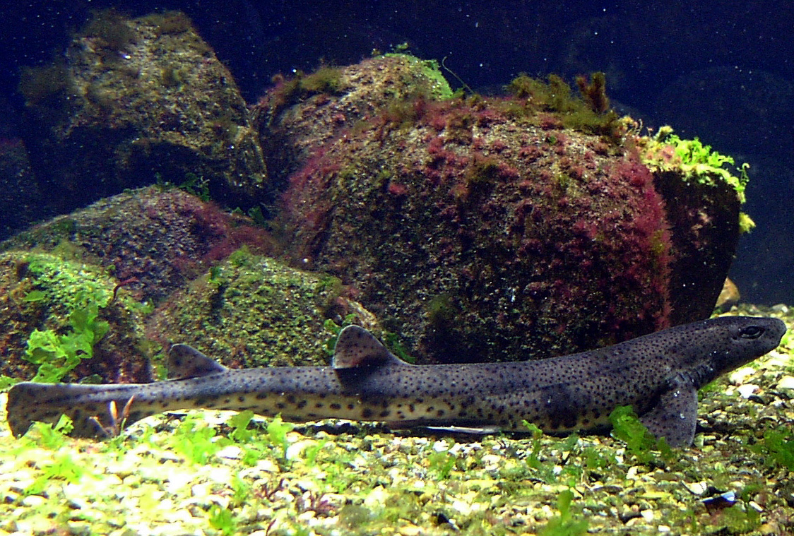 Kleingefleckter Katzenhai (Scyliorhinus canicula) in einem Aquarium. Selbst aufgenommen im Multimar Wattforum in Tönnig. Autor: Thomas Ernst